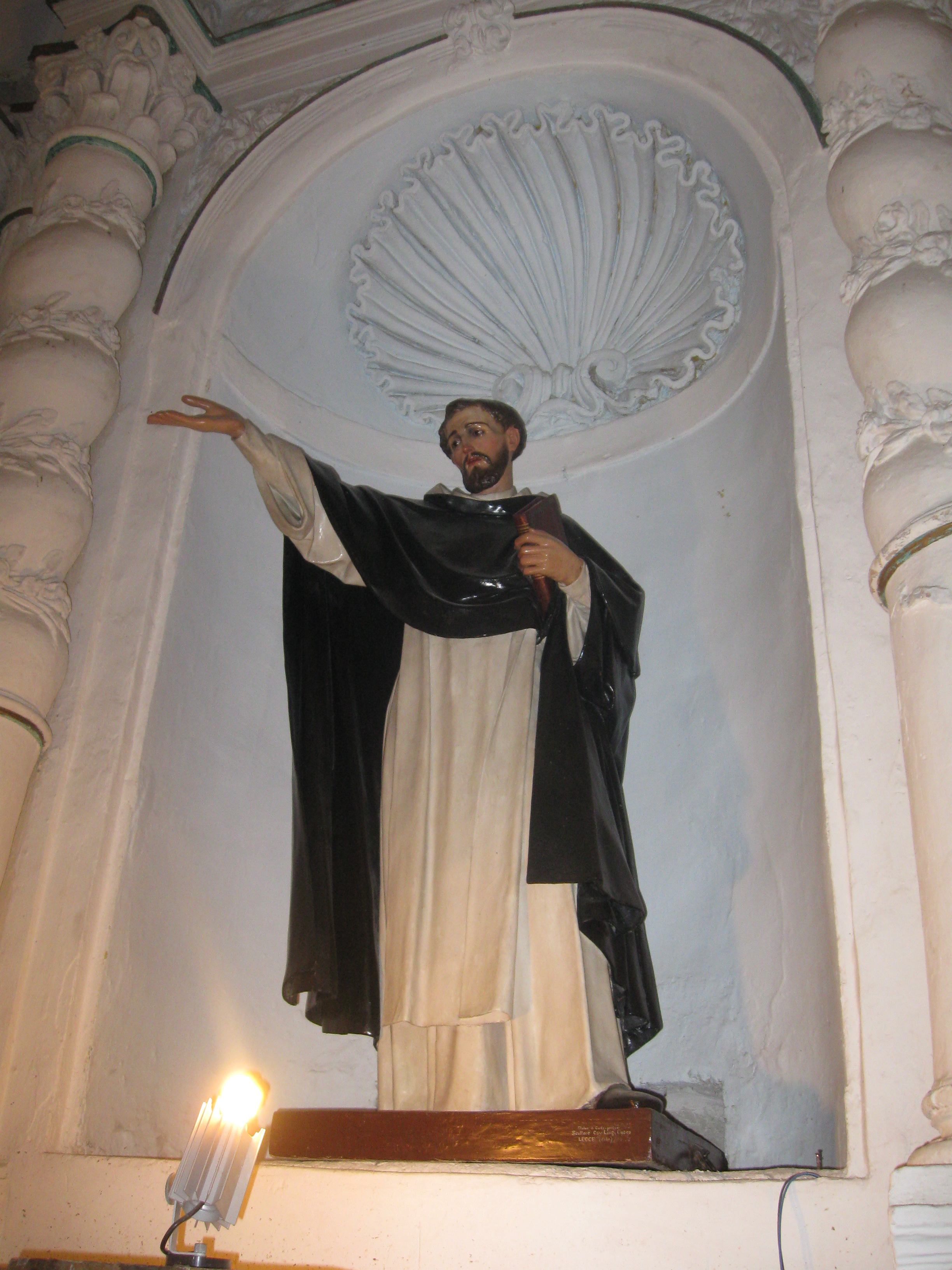 La statua di San Domenico che si conserva nella chiesa del Rosario a Licodia Eubea.